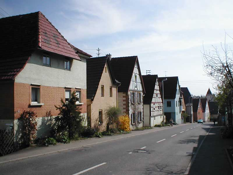 Typische kleinbäuerliche Anwesen in der Ortsstraße von Hausen an der Zaber (Brackenheim)